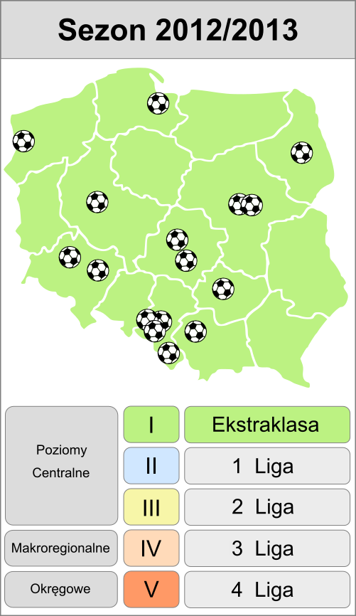 Jagiellonia w sezonie 2012/2013 - mapa